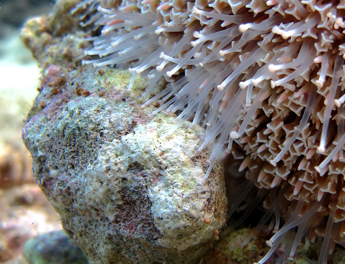 Gros plan sur les podia d'un oursin-fleur (Toxopneustes pileolus).